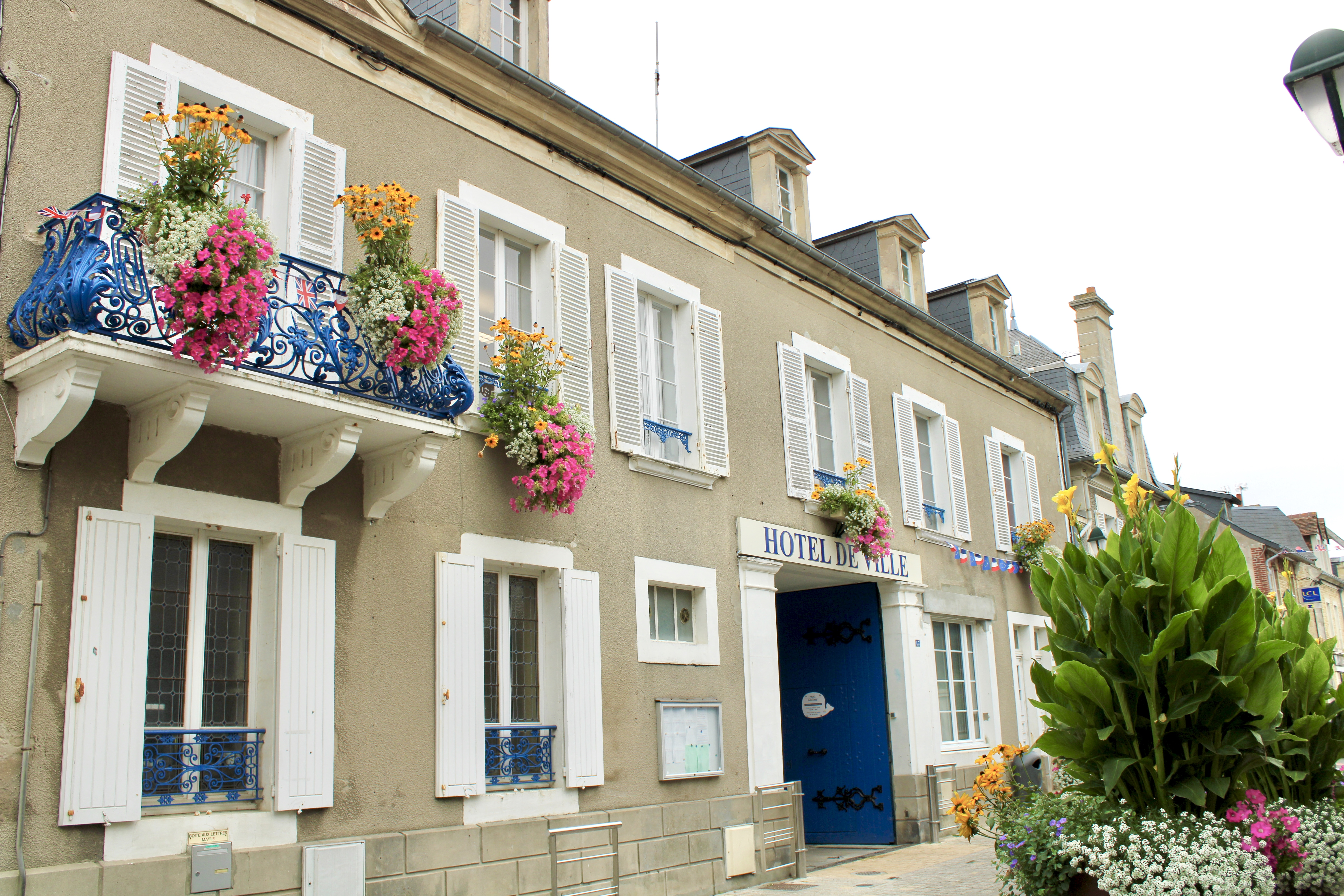 L'Hôtel-de-Ville